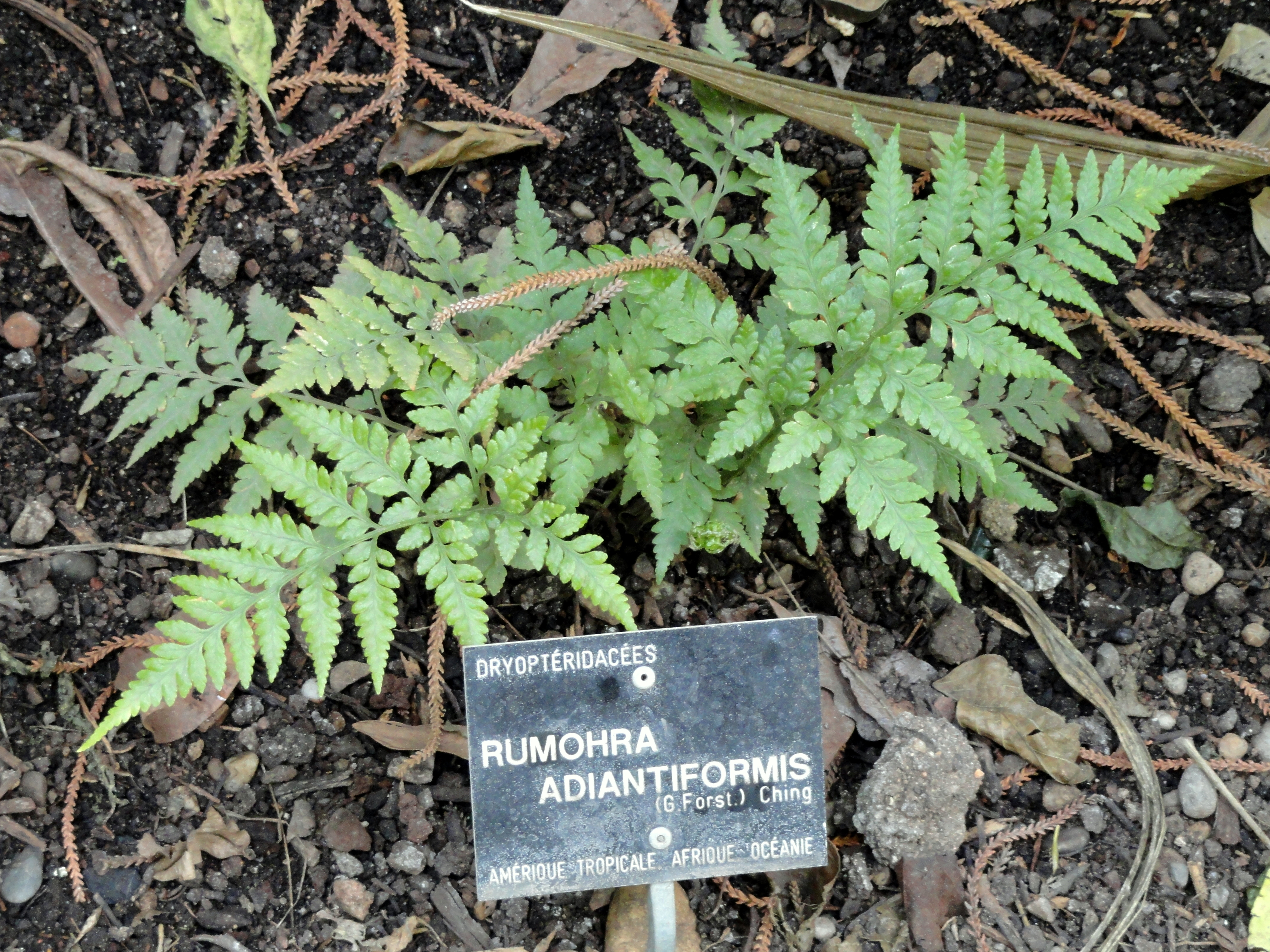 Rumohra adiantiformis specimen in the Jardin Botanique de Lyon, Parc de la Tête d'Or, Lyon, France.